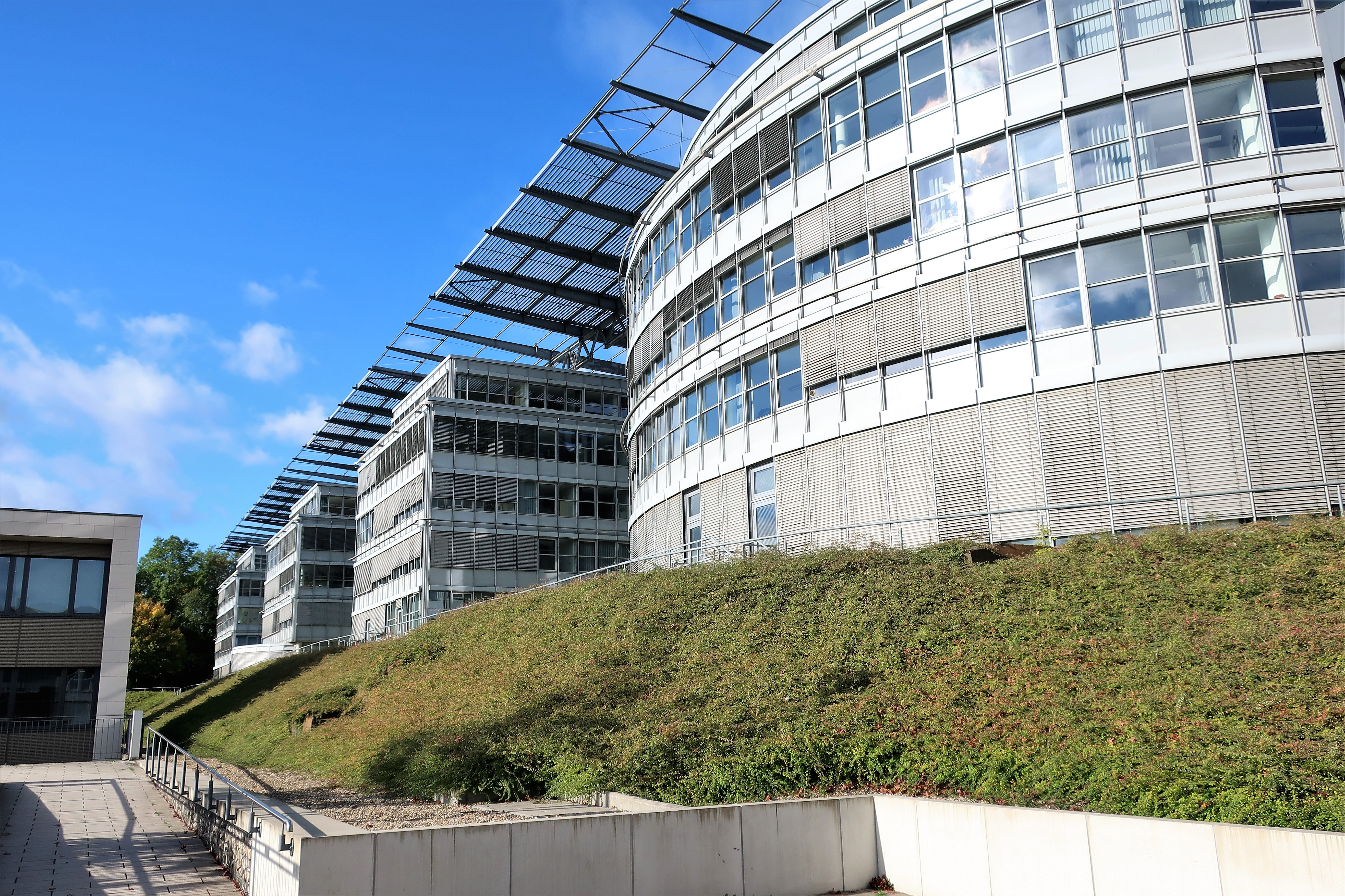 FernUniversität in Hagen. Blick auf das Informatikzentrum von Osten.